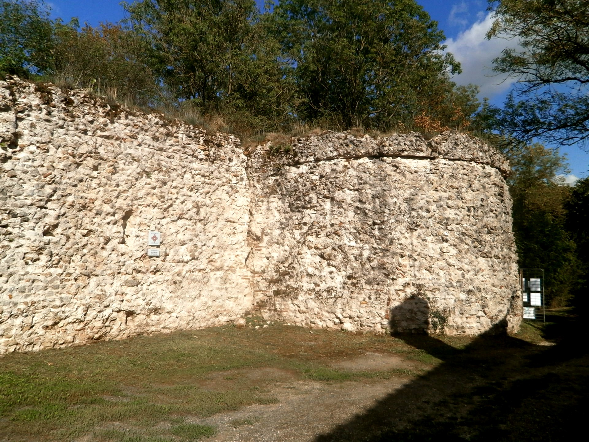 Vue de la courtine et d'une tour d'angle du castellum.